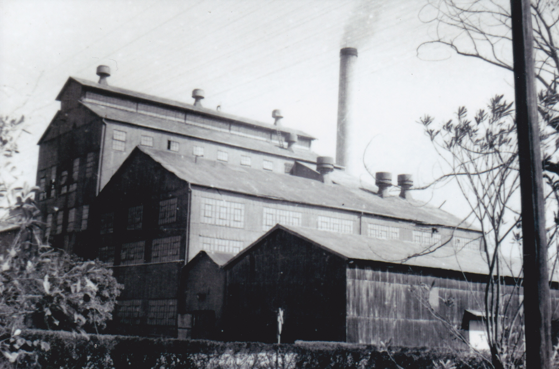 雲林縣褒忠鄉龍巖糖廠，已於1968年遭拆除。